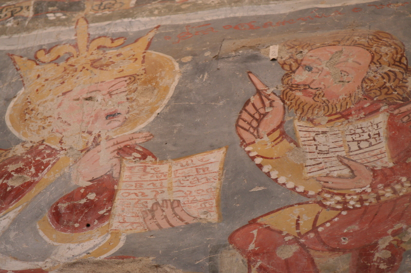 Fresken in der Kirche von Drăușeni / Draas in Rumänien.